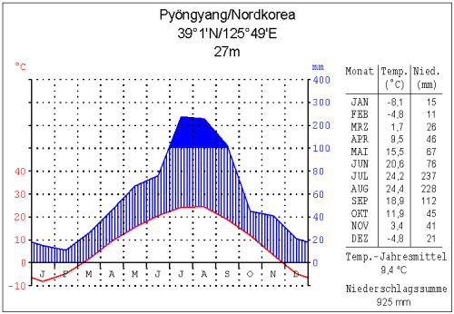 Klimadiagramm Pyöngyang